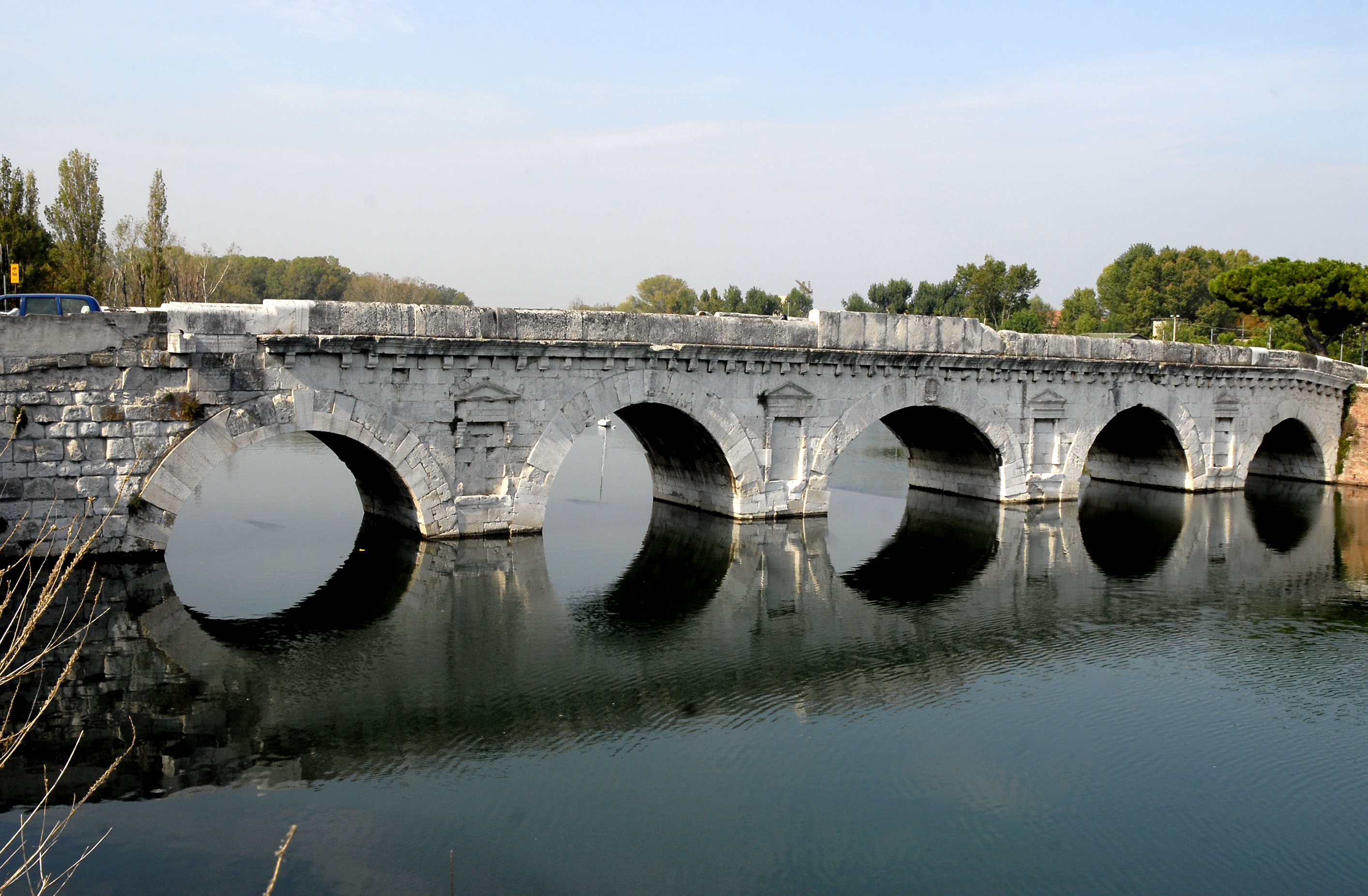 Tiberius-Brücke in Rimini 14-21 n.Chr.